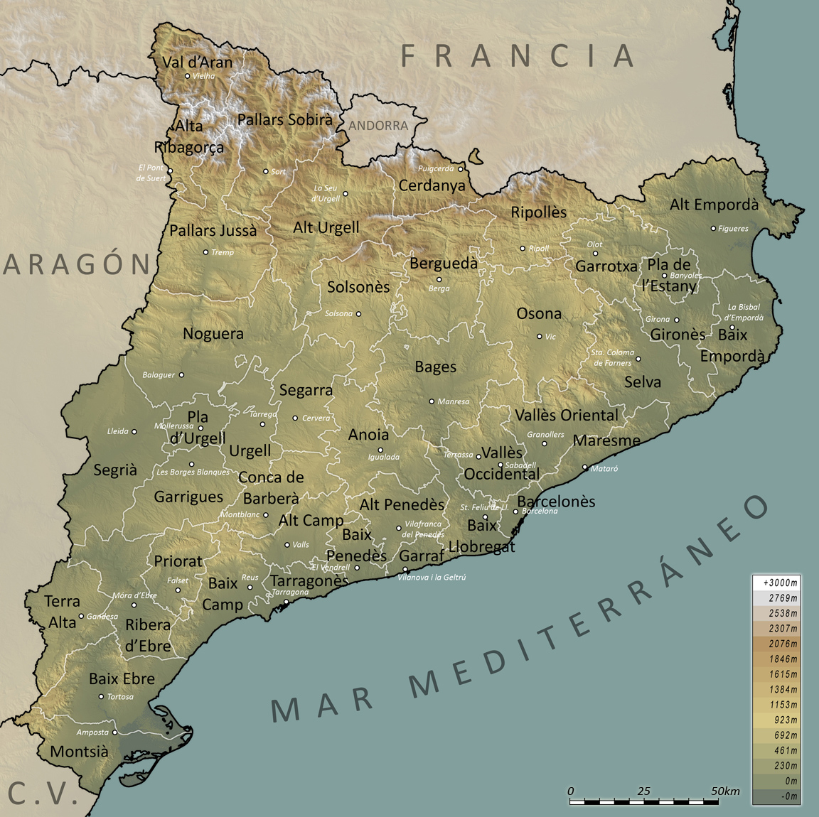 Mapa comarcal de Cataluña. Por Hansen